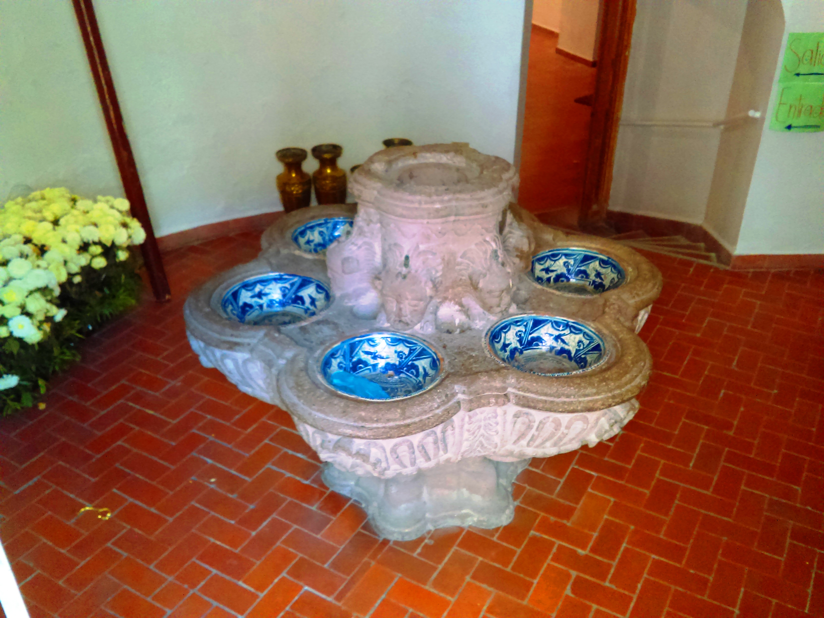 Exconvento de San Francisco en Pachuca, México.